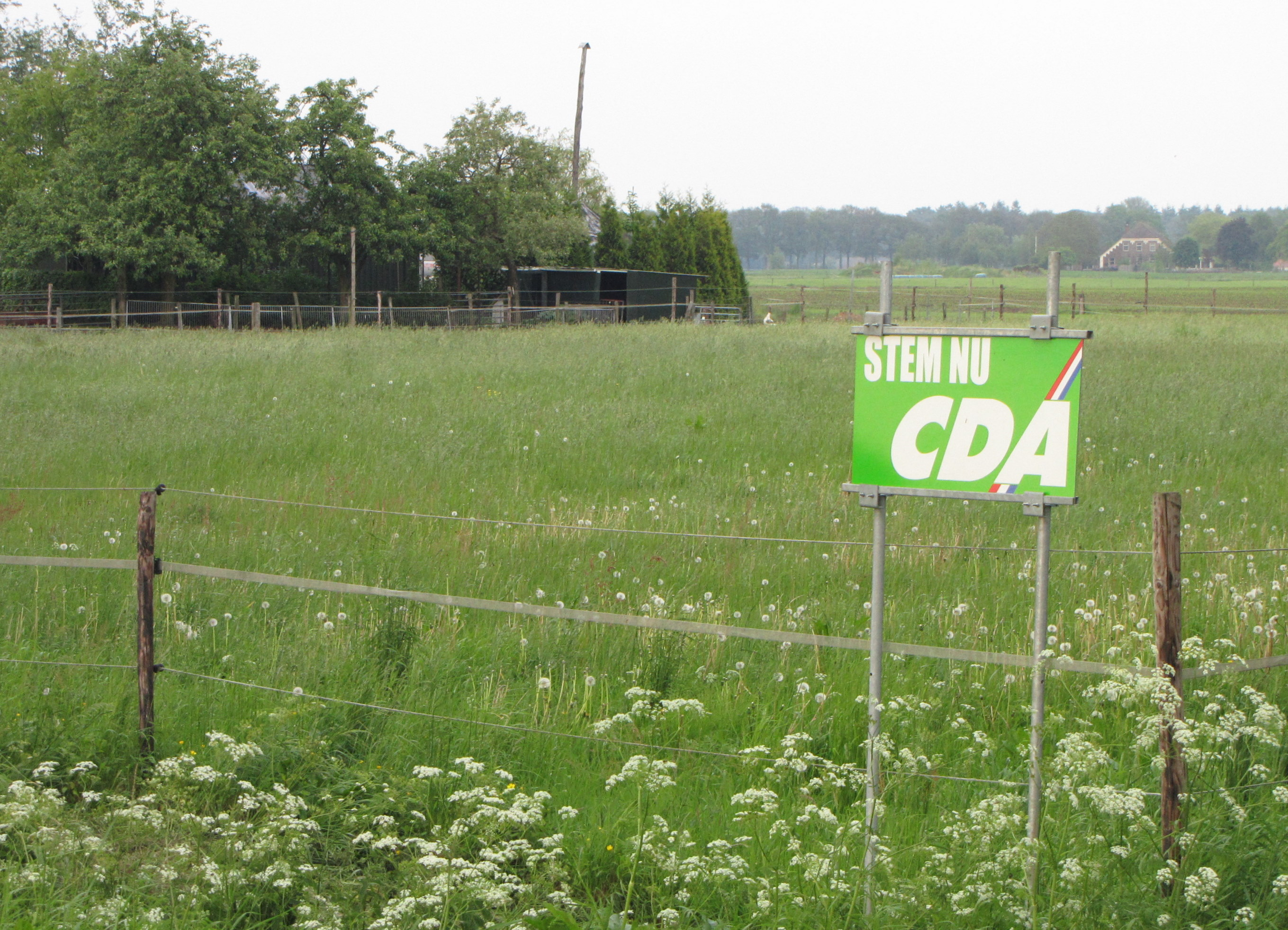 Verkiezingsbord van het CDA, bij Silvode (Oude IJsselstreek).